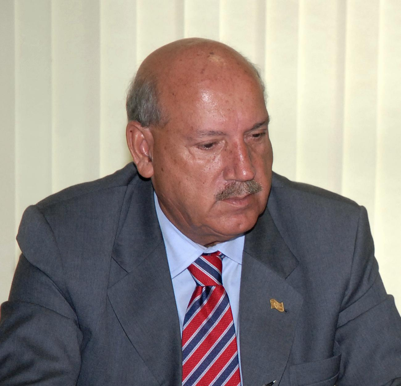 O governador do estado de Santa Catarina, Luís Henrique da Silveira.